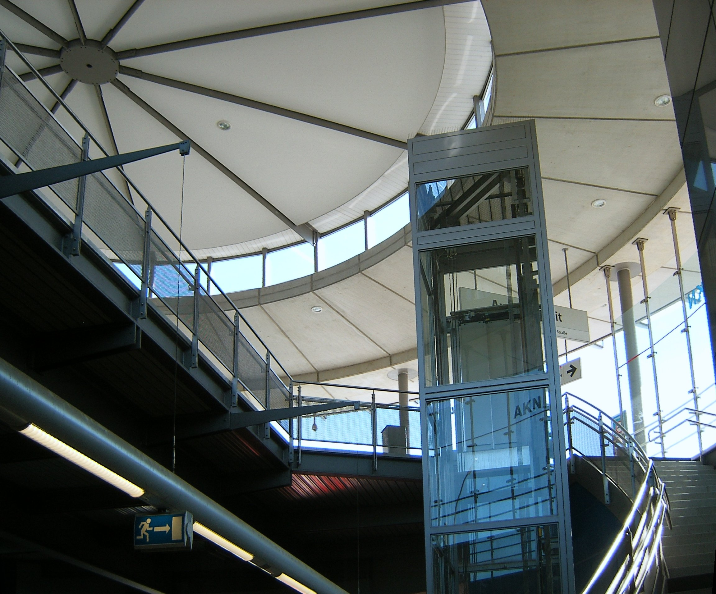 Bildbeschreibung: Hamburg, Eidelstedt, AKN-Haltepunkt Eidelstedt-Zentrum Fotograf: selbst Datum: 9.6.2006